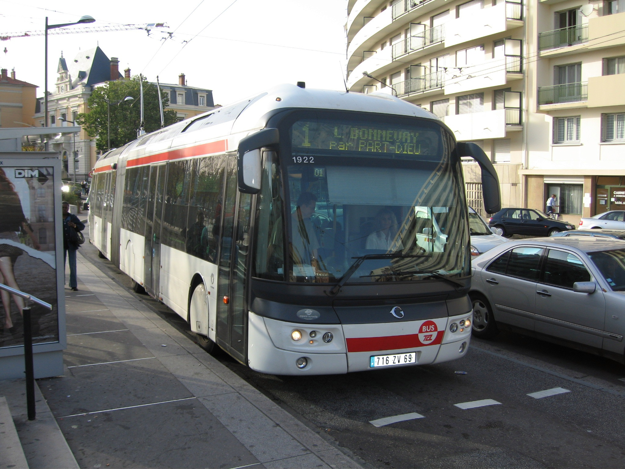 trolleybus Cristalis ETB18, place Grandclément à Villeurbanne